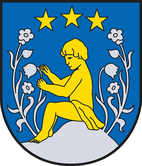 Das Wappenbild geht auf eine Sage zurück, die besagt, dass ein Kind, das durch ein Hochwasser mitgerissen wurde, völlig unversehrt in Kindberg angespült wurde. Man fand es dort auf einer Wiese sitzend und mit einer Blume spielend vor.